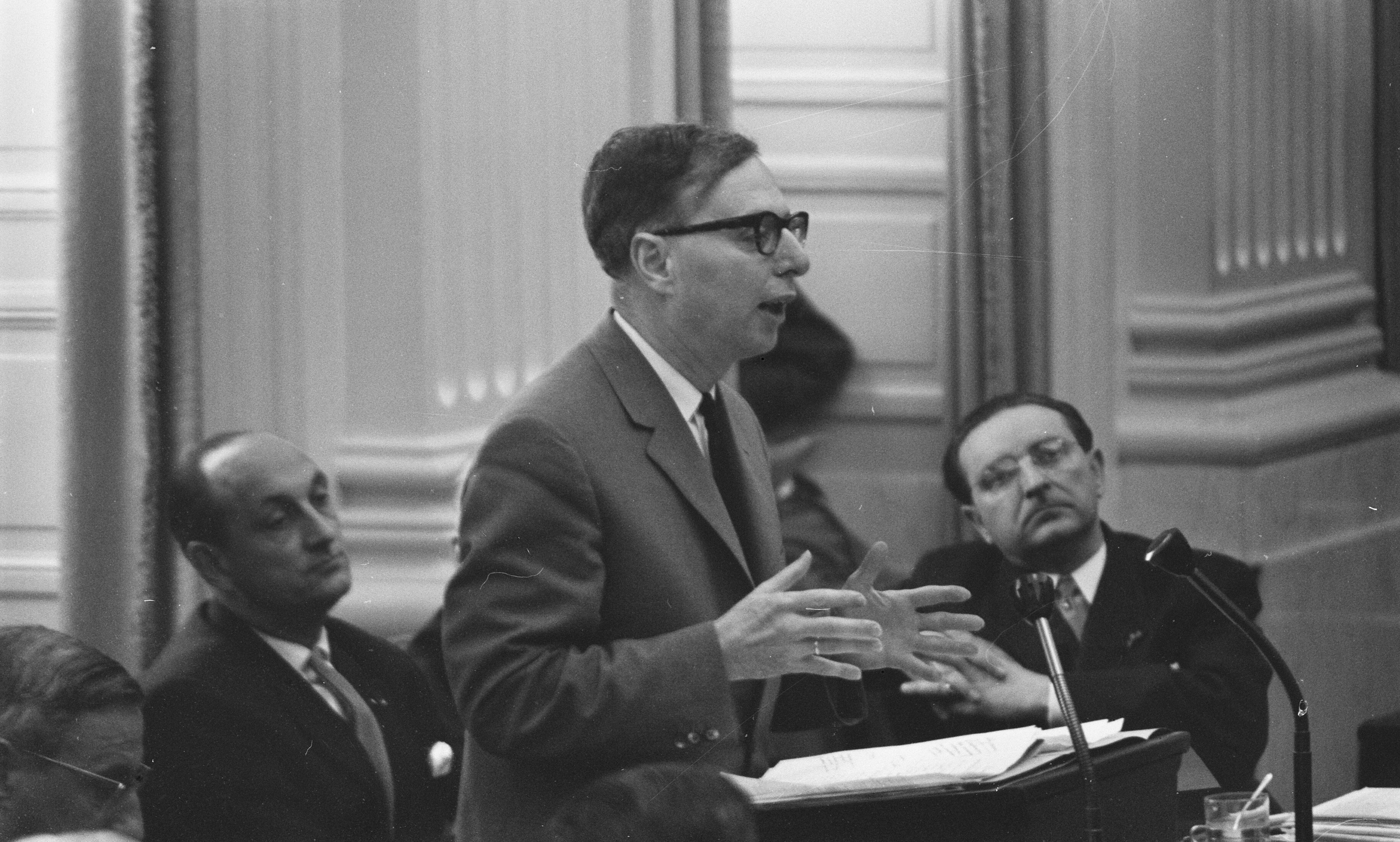 Collectie / Archief : Fotocollectie Anefo Reportage / Serie : [ onbekend ] Beschrijving : Zitting der Tweede Kamer, debatten over loonpolitiek Minister van Financien professor Zijlstra aan het woord Datum : 16 juli 1959 Fotograaf : Pot, Harry / Anefo Auteursrechthebbende : Nationaal Archief Materiaalsoort : Negatief (zwart/wit) Nummer archiefinventaris : bekijk toegang 2.24.01.05 Bestanddeelnummer : 910-5335